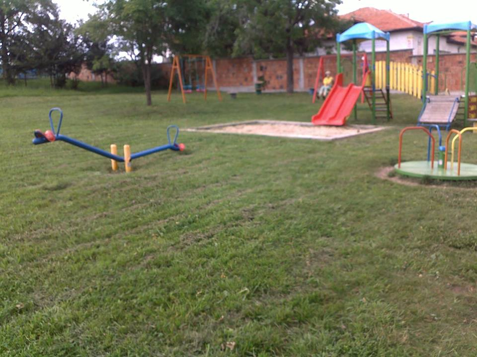 Детската площадка в с. Пожарево (Софийска област)